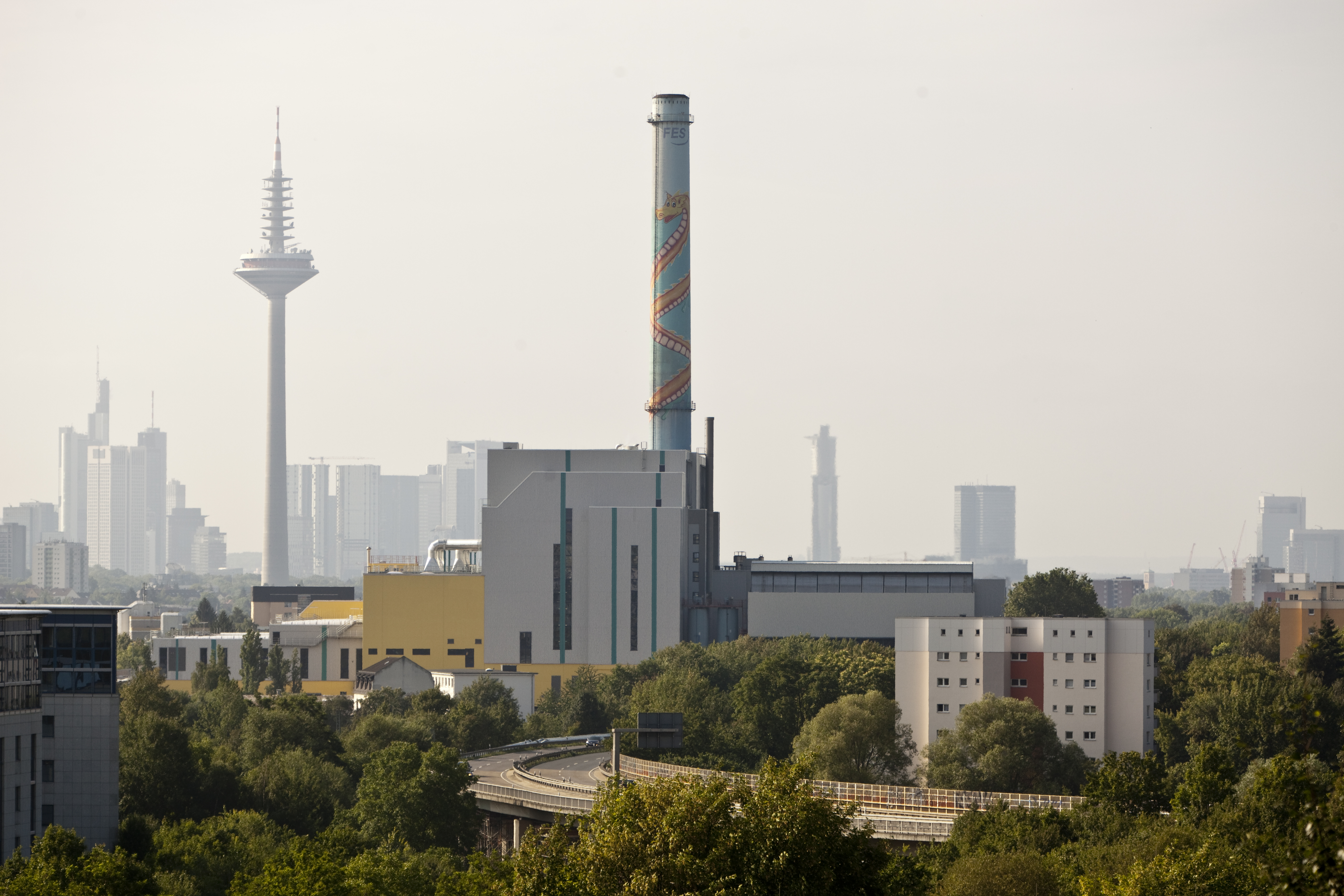 Müllheizkraftwerk (MHKW) Nordweststadt von Mainova in Frankfurt am Main